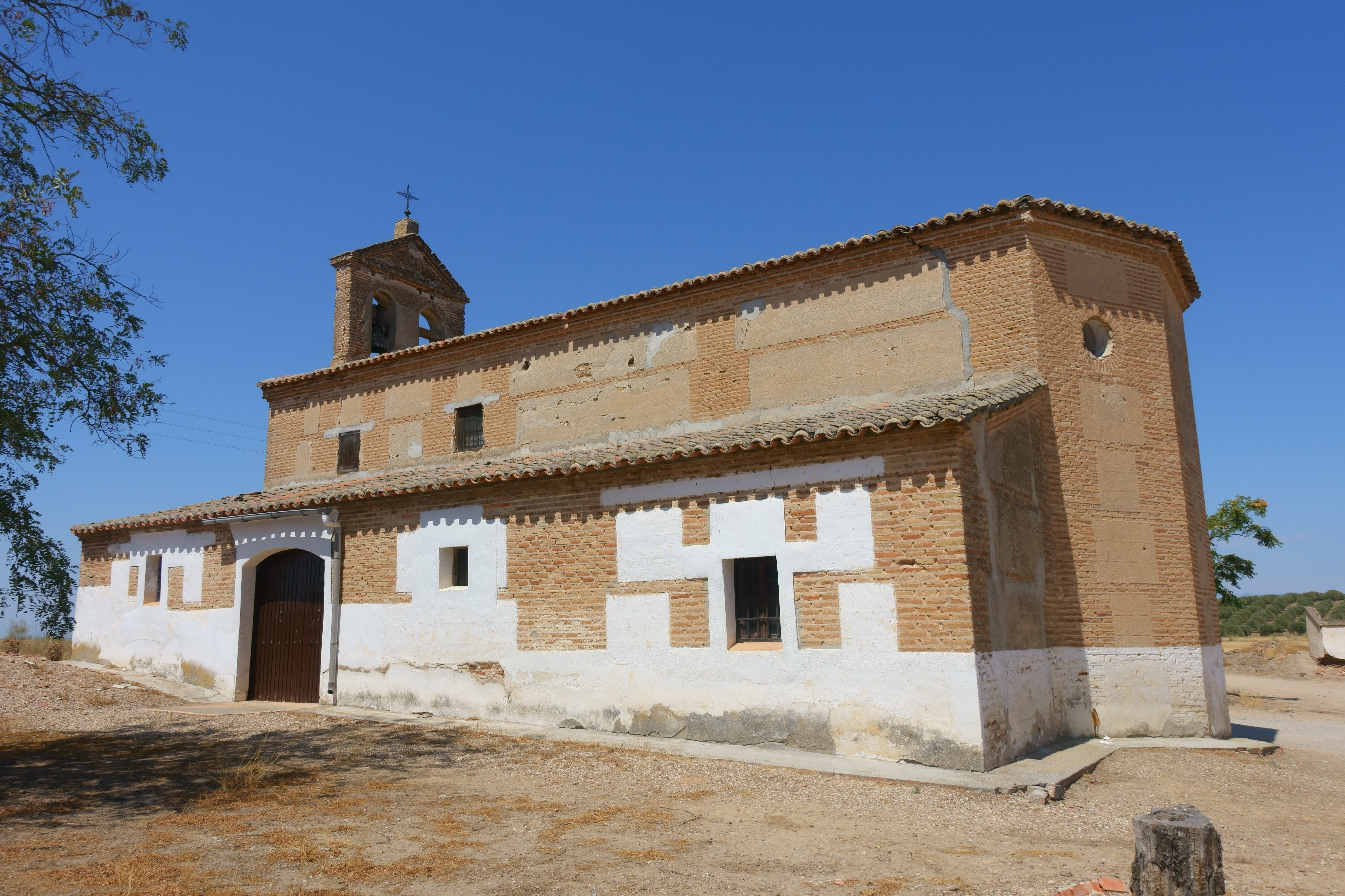 Iglesia de la Asunción de Nuestra Señora, Illán de Vacas (Toledo, España).